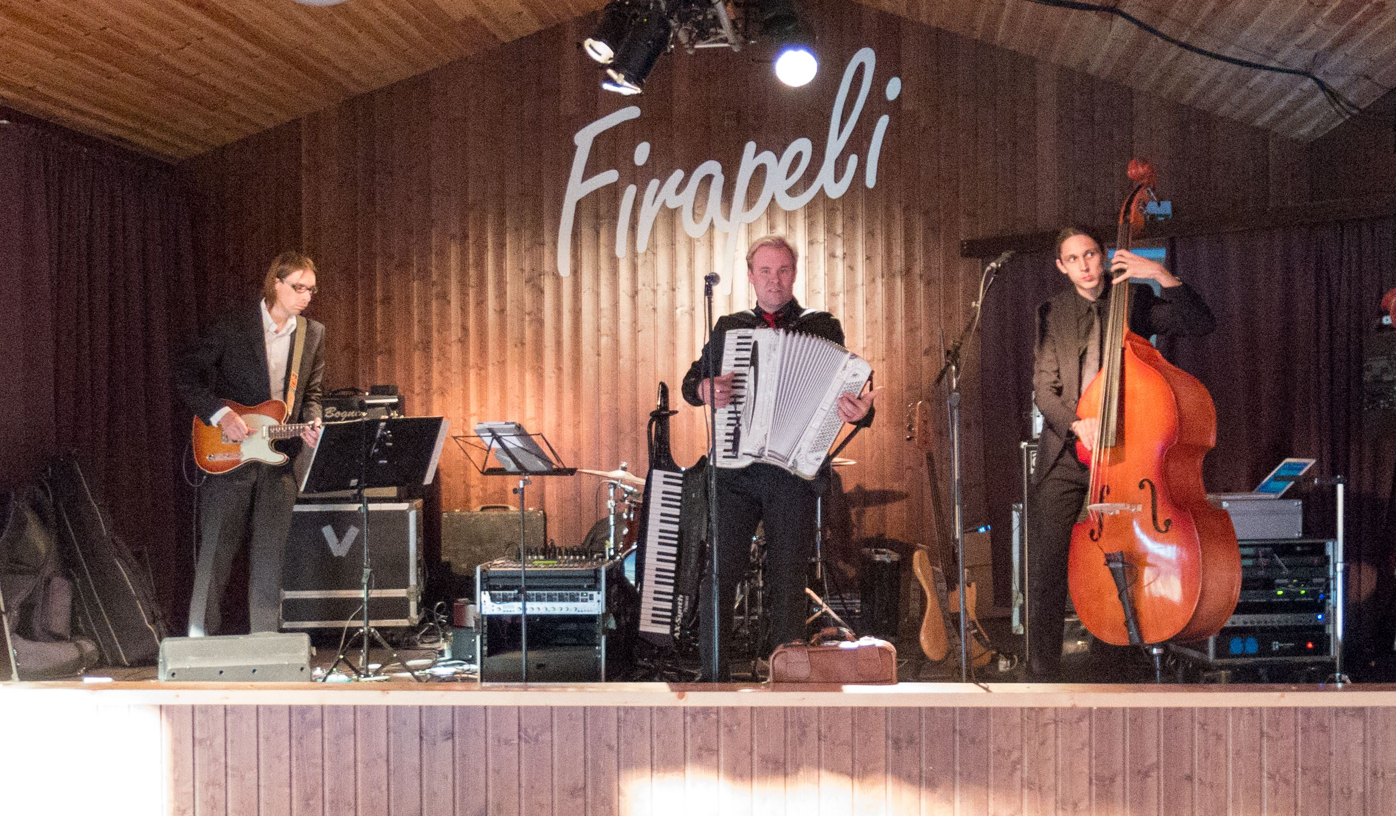 Teemu Harjukari ja Taivaanrannanmaalarit